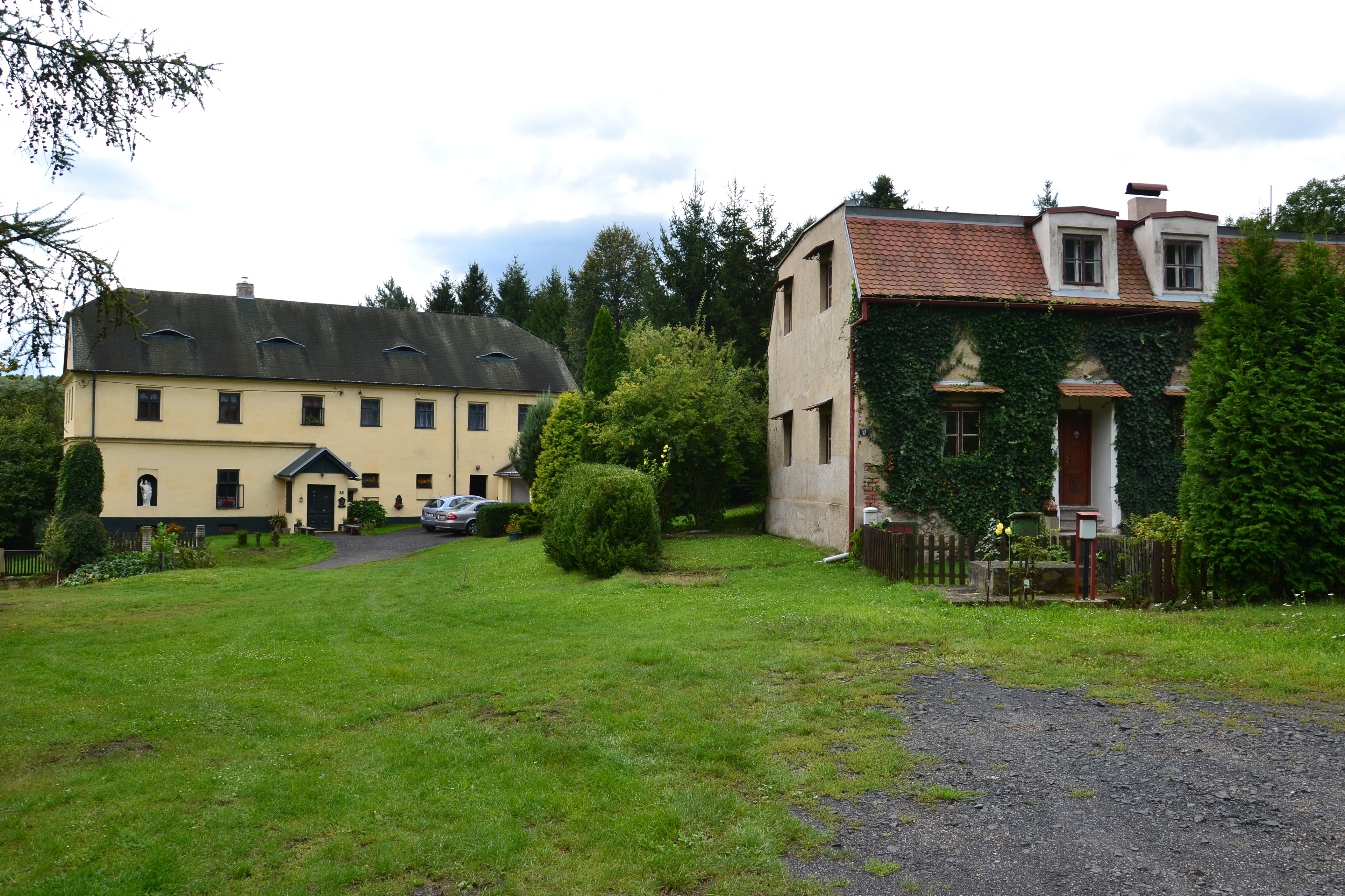 Dolánky – domy čp. 1 (vlevo) a 17